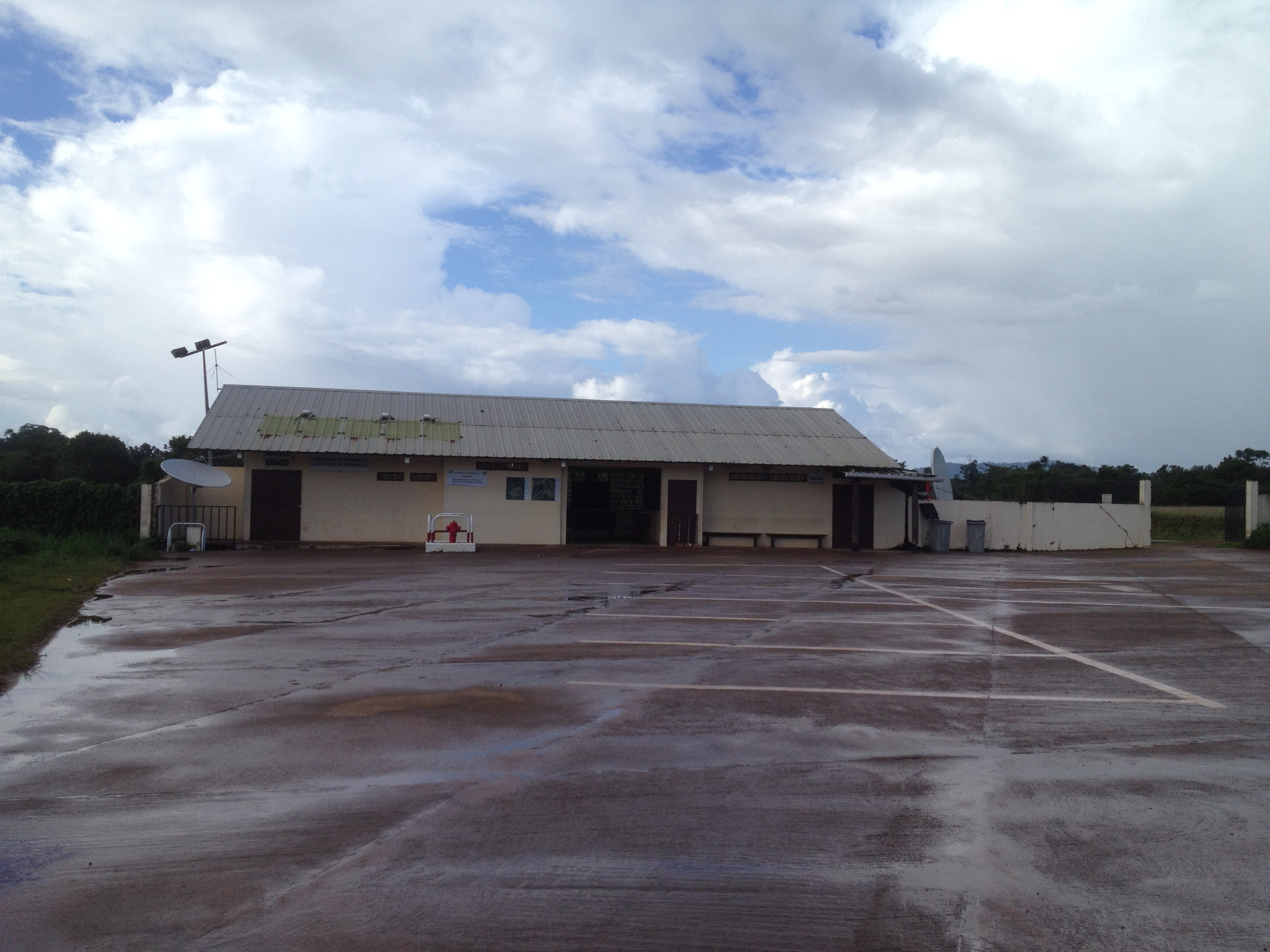 Aéroport de Maripasoula - parking et hangar d'embarquement